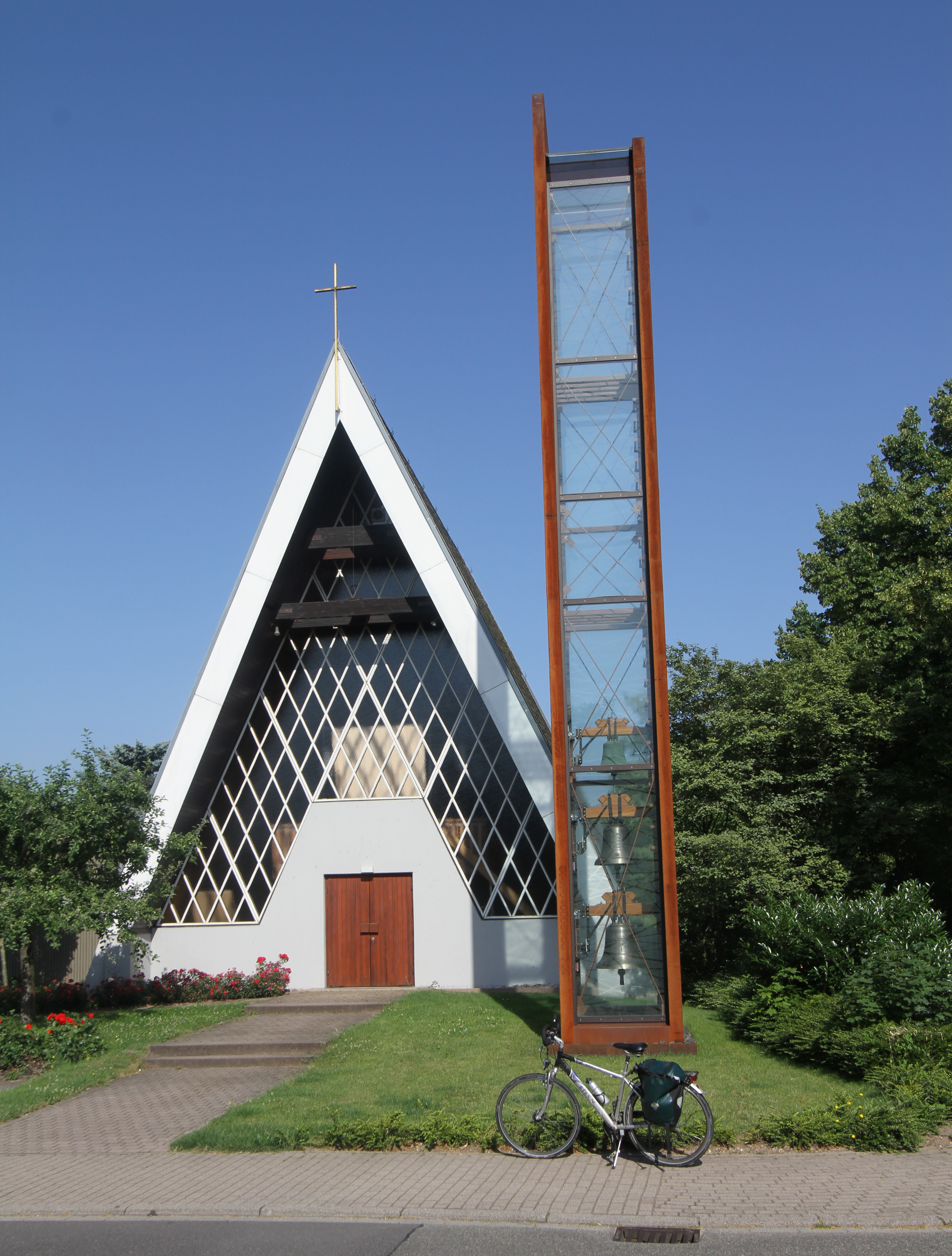 Matthäuskirche in Sinzheim.